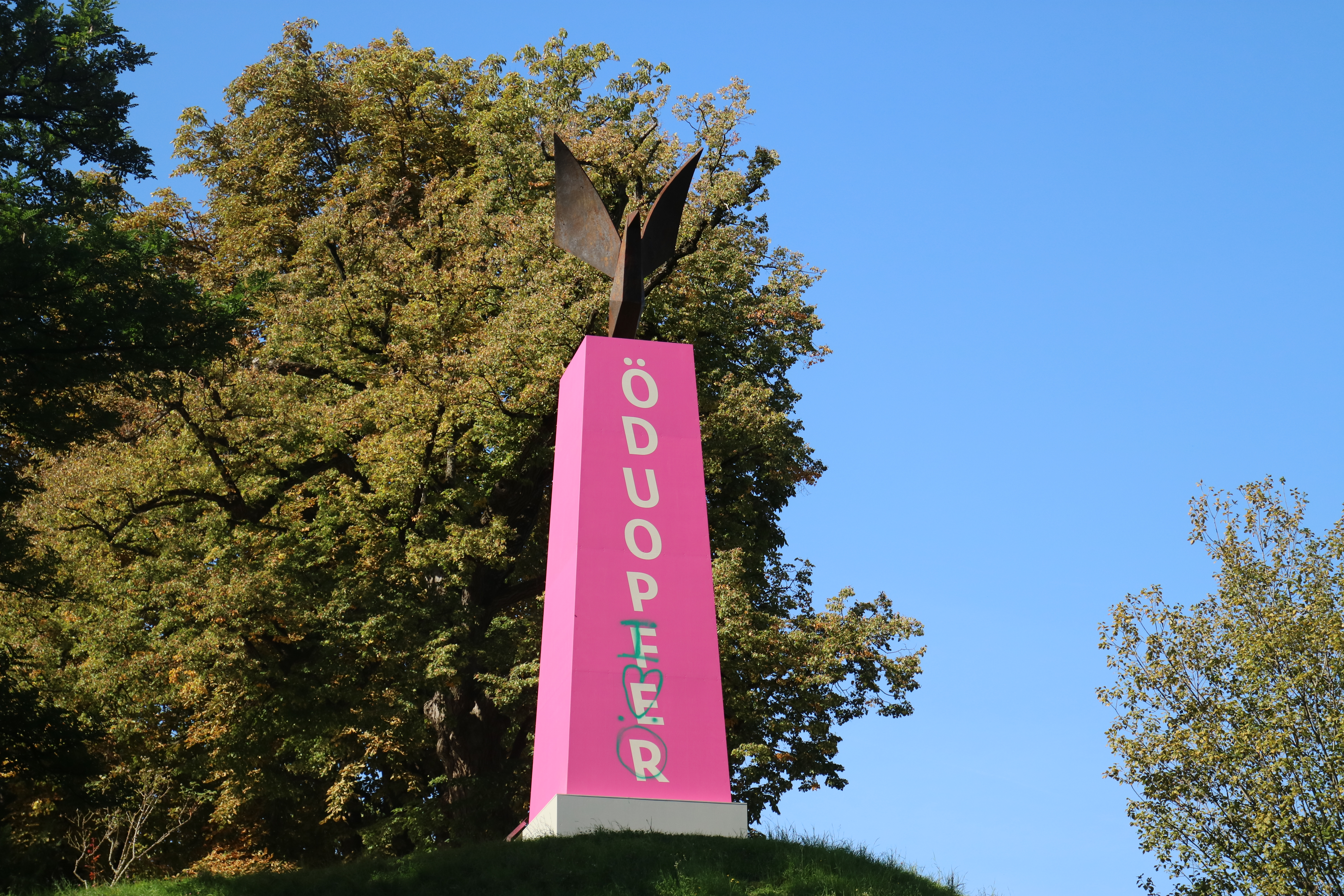 Eduard Freudmann: Monumyth (2019), Kunstinstallation am Grazer Freiheitsdenkmal (Adler-Befreiungsdenkmal) anlässlich des steirischen herbst 2019, die sich kritisch mit dem Opfermythos Österreichs auseinandersetzt